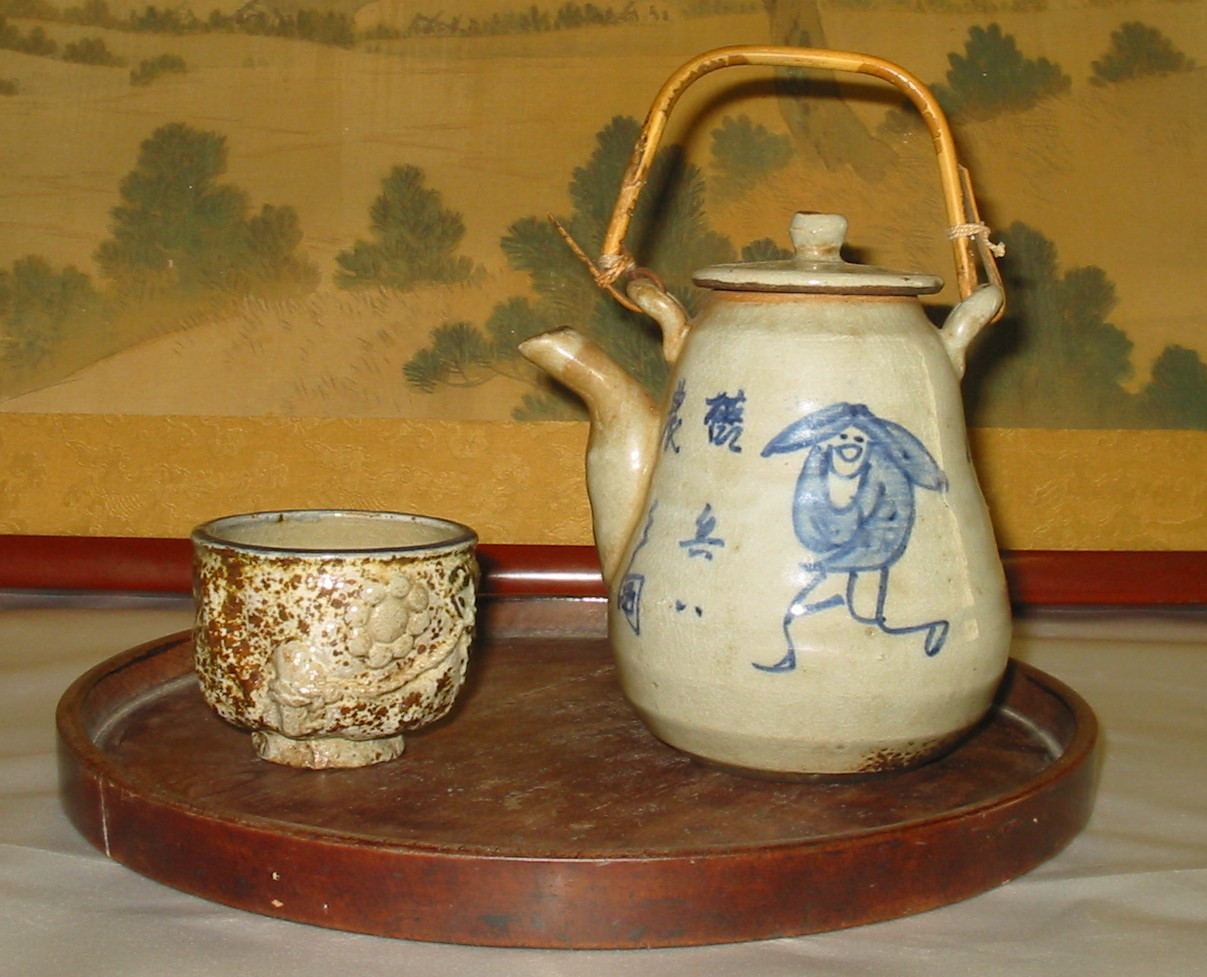 乙川公民館にて保存用用資料として撮影